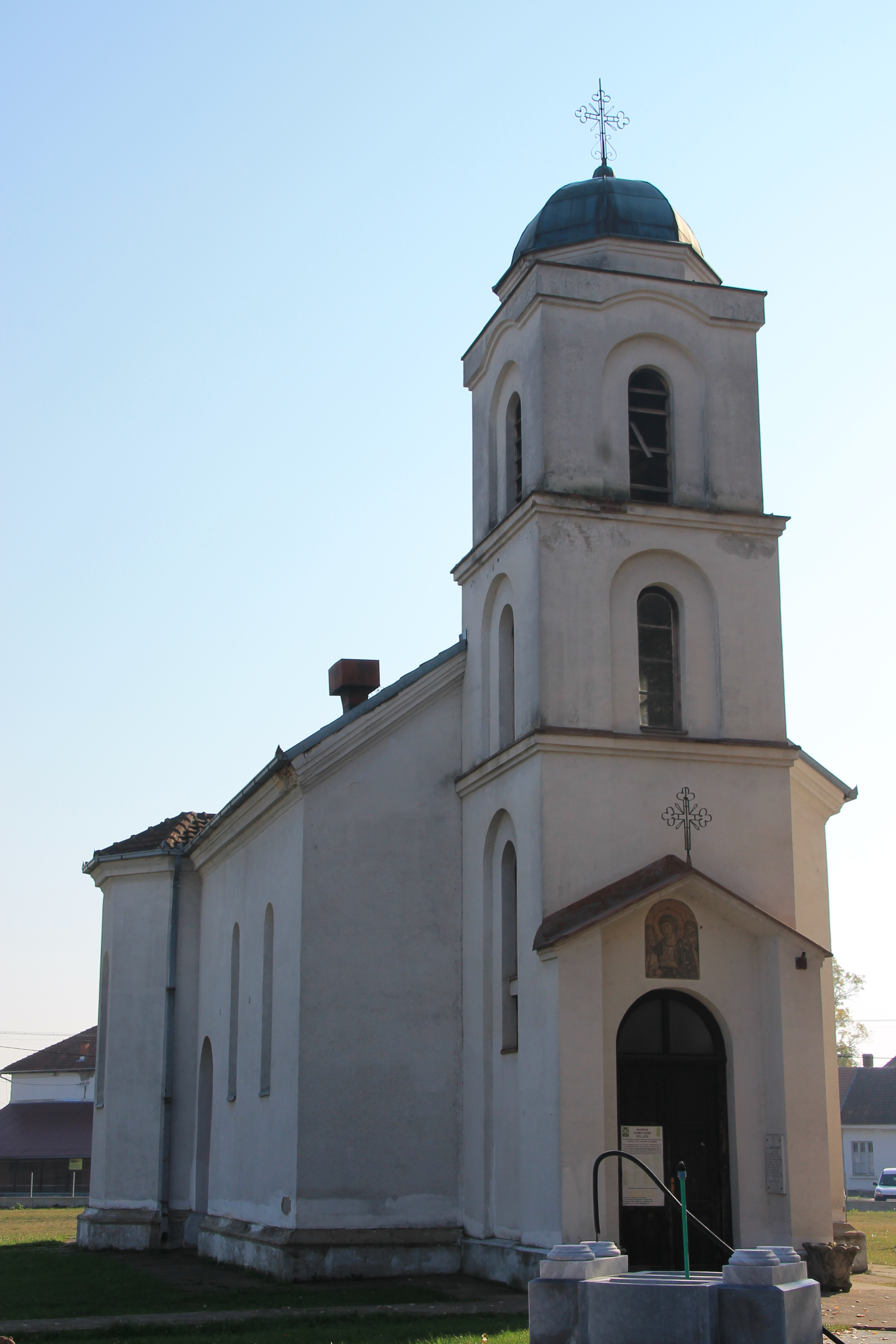 Crkva Sv. arhangela Gavrila (Zablaće)